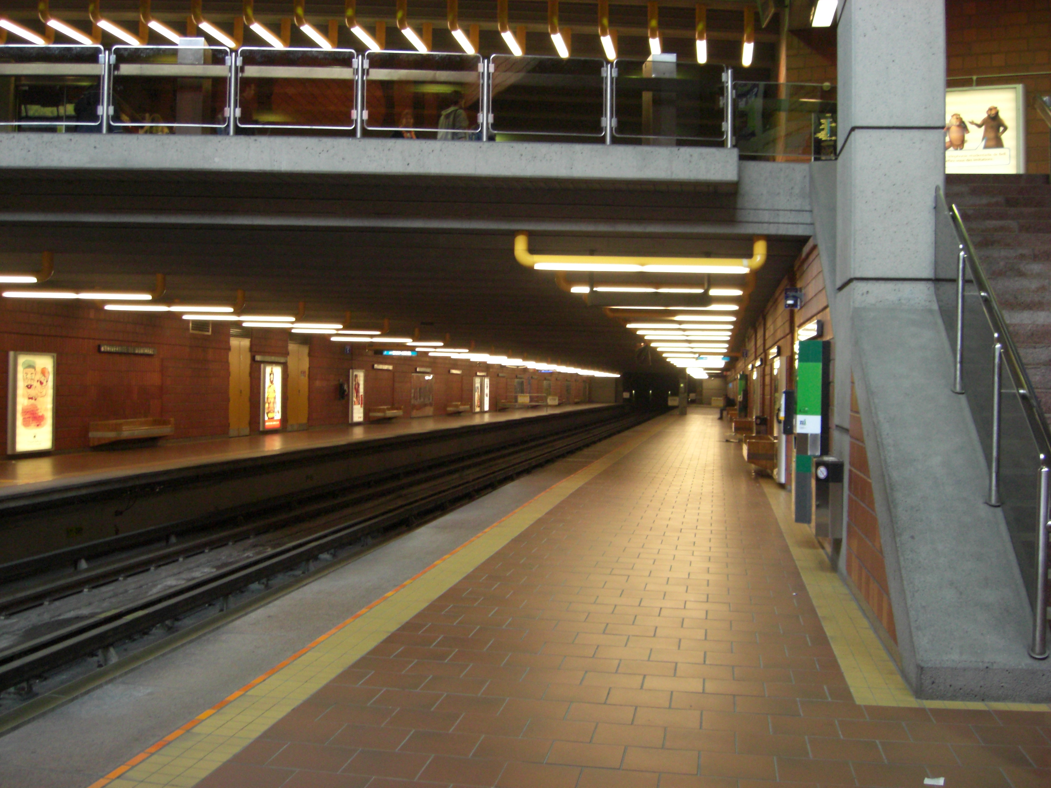 Station Université-de-Montréal du métro de Montréal